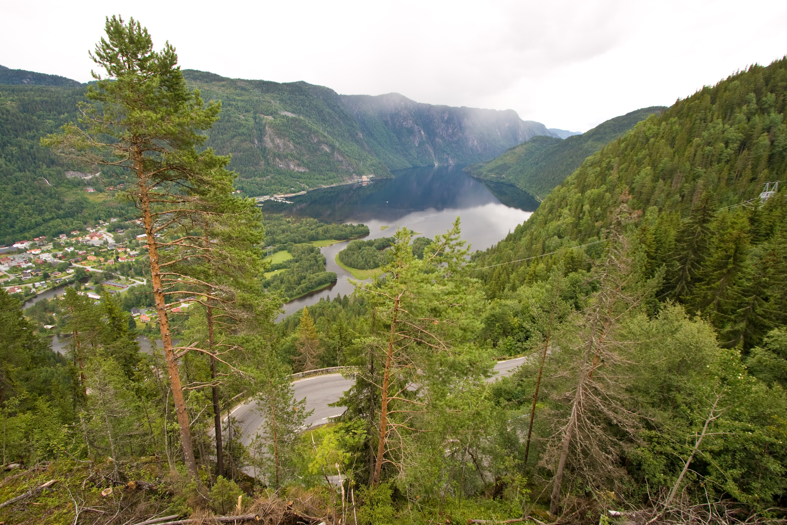 Dalen i Telemark. Innsjøen er Bandak. Vegen er Riksveg 45.